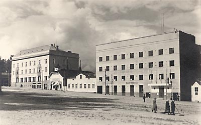 Valtiontalo eli Suojeluskuntatalo Jyväskylä, 1930-luvulta